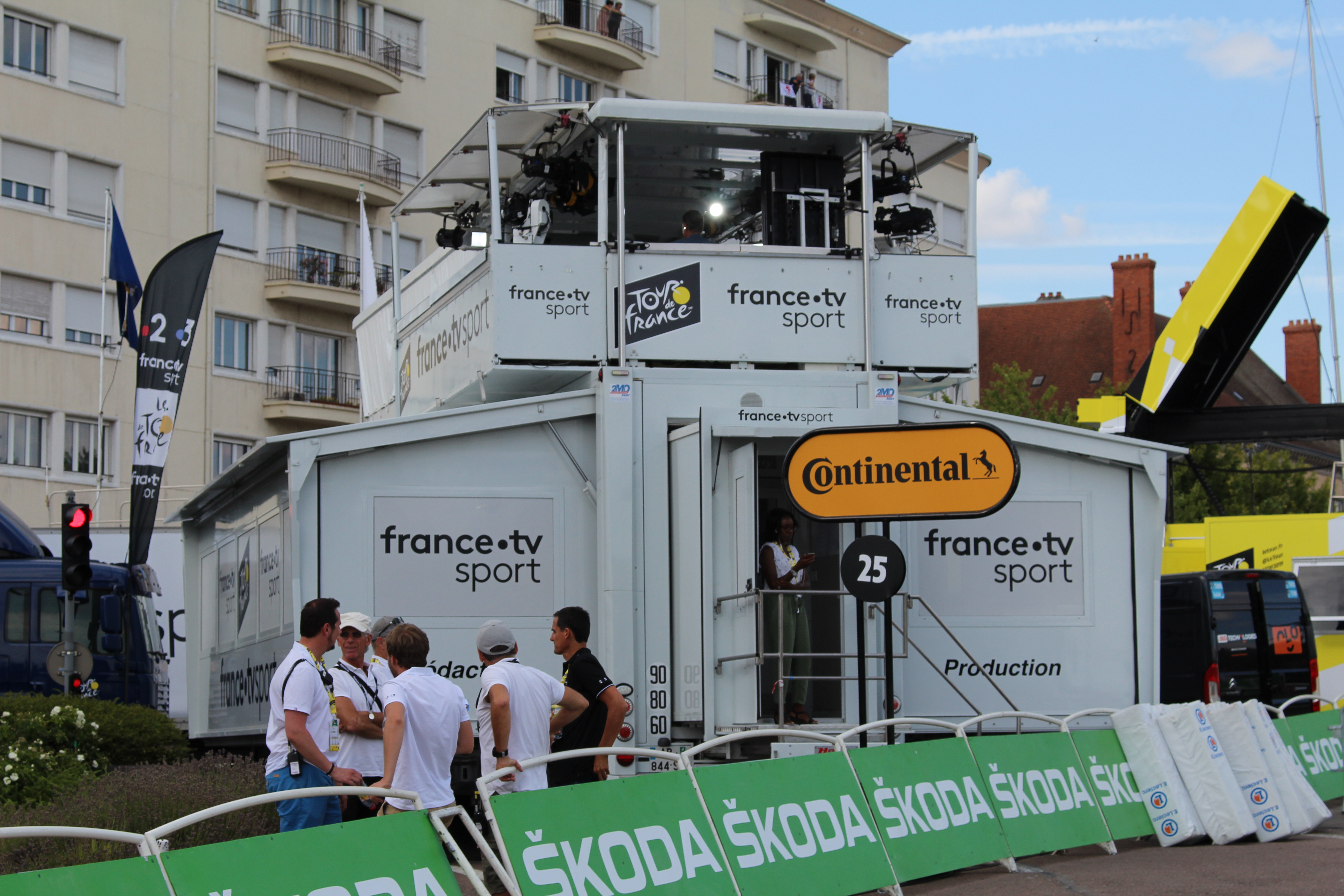 Arrivée de la 7e étape du Tour de France 2019 à Chalon-sur-Saône, 12 juillet 2019.